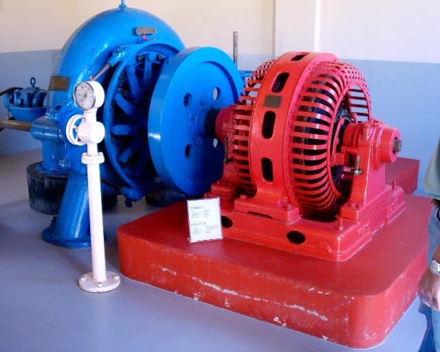 Foto tirada em 05/04/2003 na usina hidrelétrica de Foz do Areia no Paraná. Gerador e turbina, já fora de operação, expostos no local.